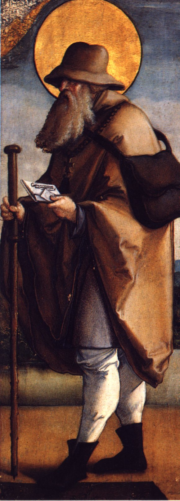 Ausstattung der ehemaligen Seitenaltäre der Meßkircher St. Martinskirche, Standflügel: Heiliger Jodokus mit Pilgerstab Eingescannt aus: Anna Moraht-Fromm und Hans Westhoff: Der Meister von Meßkirch – Forschungen zur südwestdeutschen Malerei des 16. Jahrhunderts, Ulm, 1997, S. 178